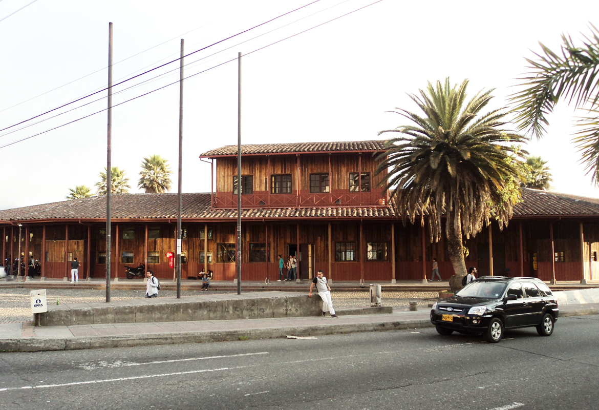 Antigua Estación del Cable Aéreo. Actual Facultad de Arquitectura de la Universidad Nacional Sede Manizales.